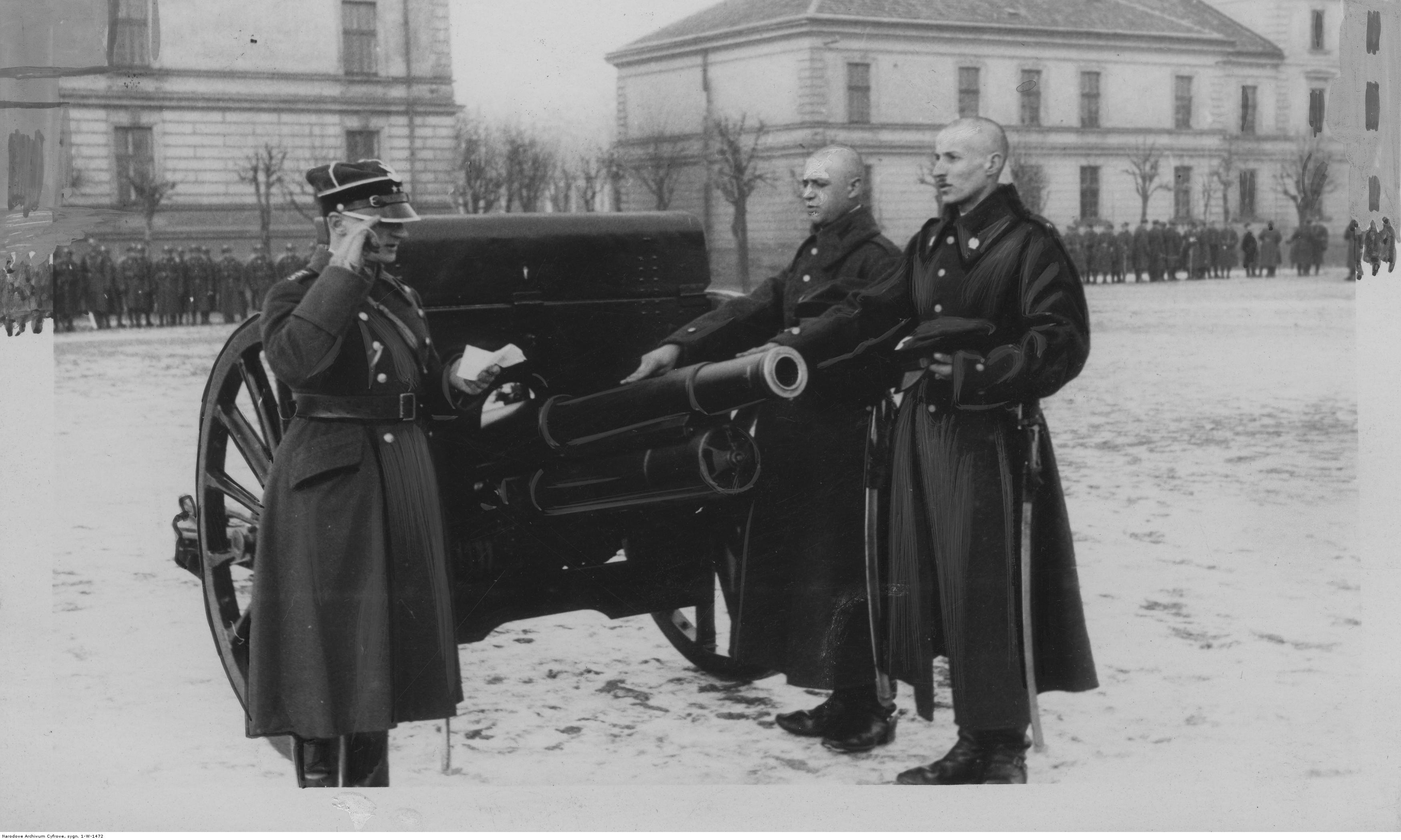 Uroczystość zaprzysiężenia rekrutów w 5 Dywizjonie Artylerii Konnej w Krakowie. Rekruci składają przysięgę na 75 mm armatę wz. 1902/26. Koncern Ilustrowany Kurier Codzienny - Archiwum Ilustracji. Sygnatura: 1-W-1472